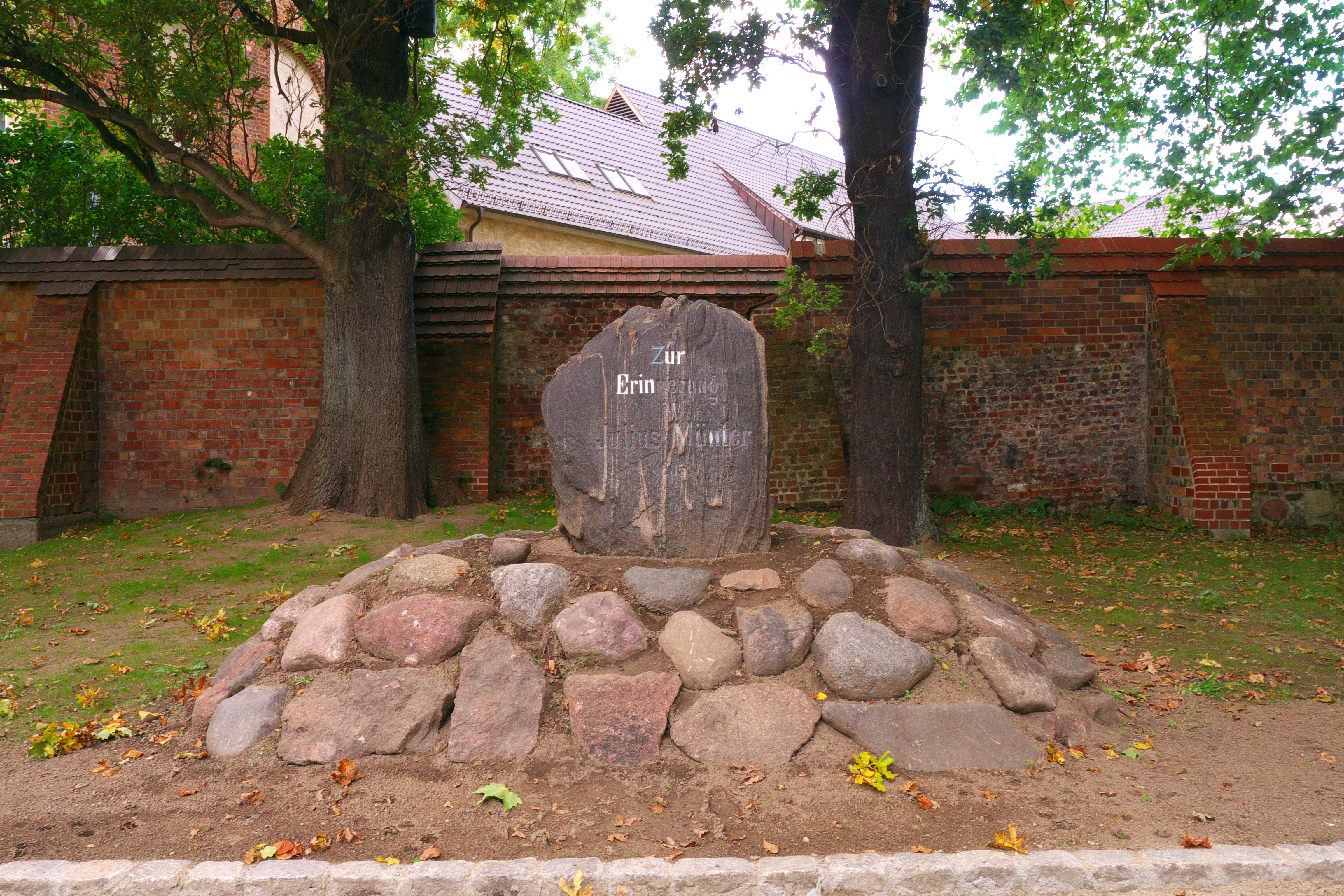 Julius Münter Denkmal in Greifswald, im Hintergrund die Stadtmauer